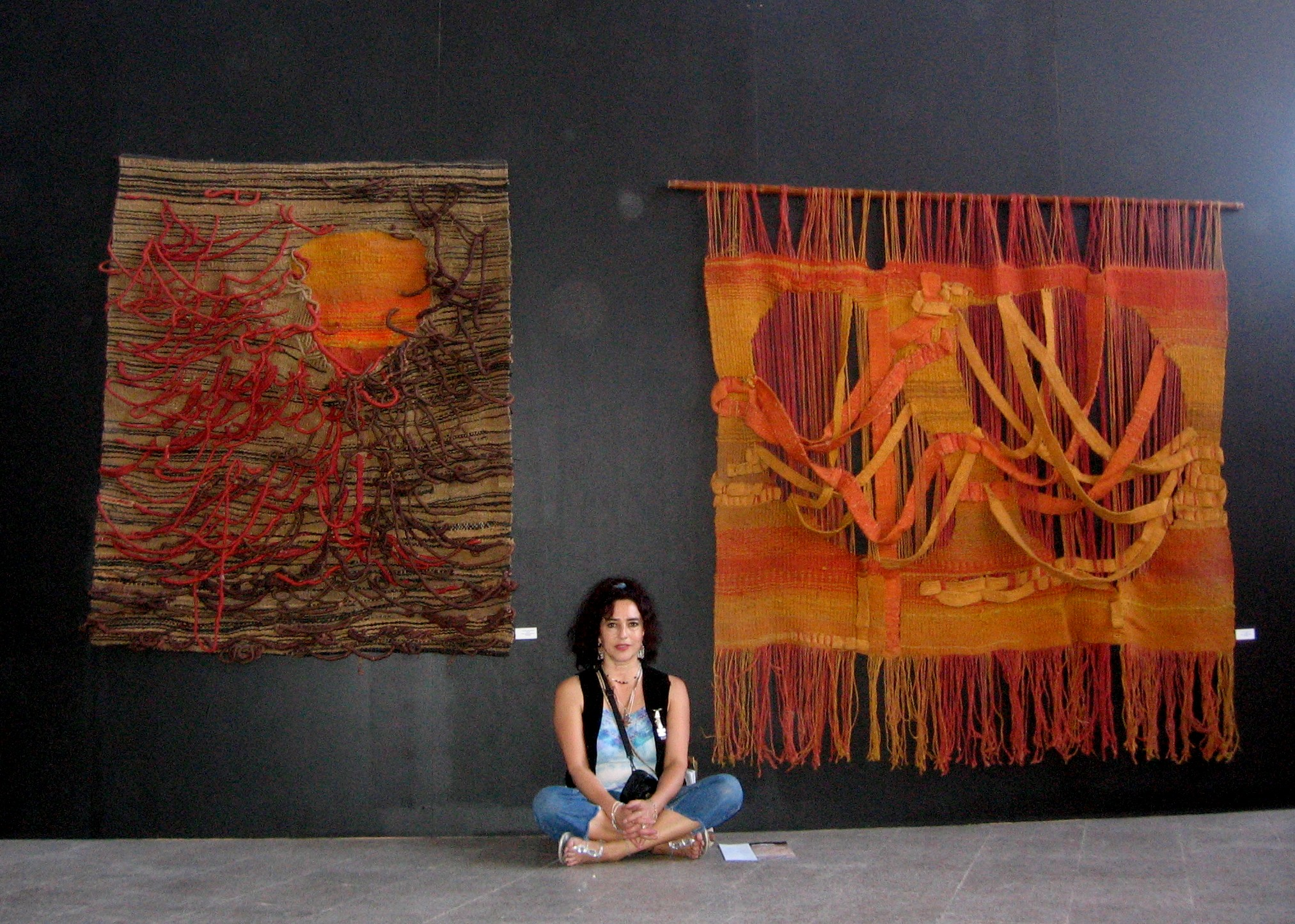 Lorena Lemunguier Quezada junto a sus obras ”Ponwi mapu kütral” y "Kalku renü", tapices tridimensionales con los que participó como artista invitada en la primera Bienal de Arte Indígena, Chile. Estación Mapocho